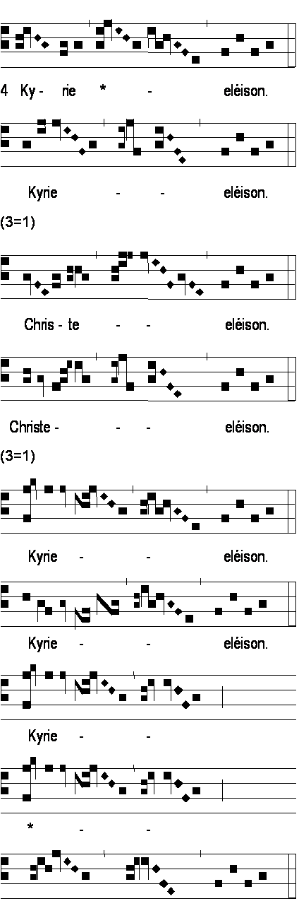 Kyrie 3 (Kyrie Deus sempiterne)